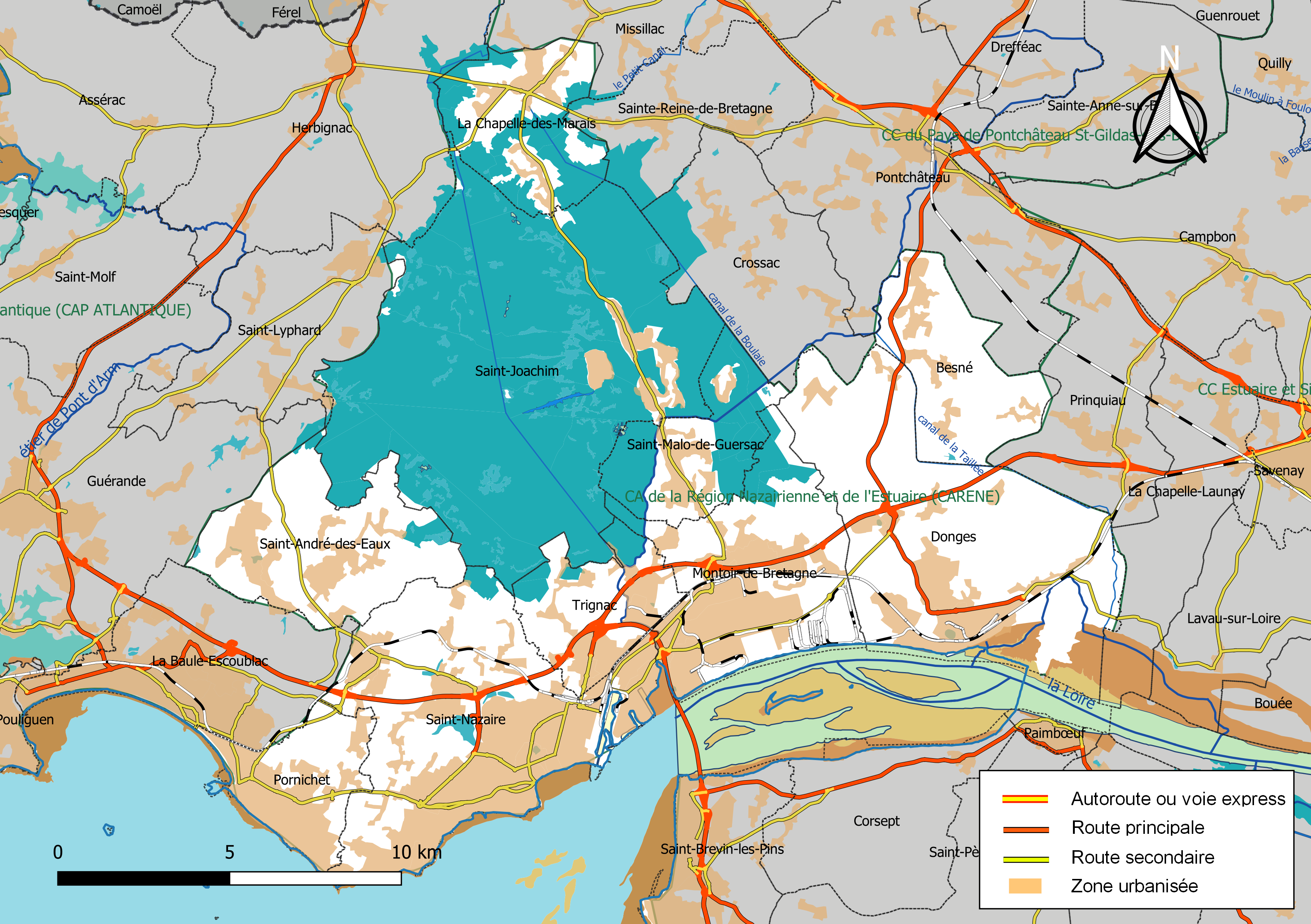 Carte géographique de la Communauté d'agglomération de la Région Nazairienne et de l'Estuaire, département de la Loire-Atlantique, France. Composition au 1er janvier 2019.